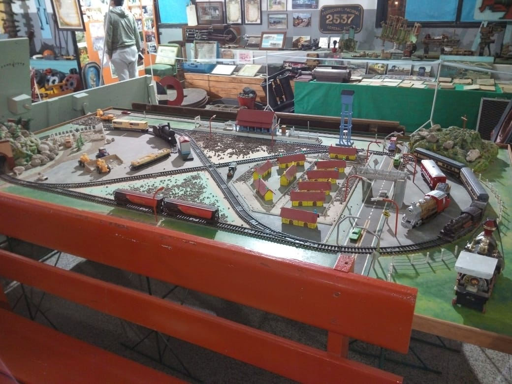 La imagen representa una maqueta en miniatura de la Estación Ferroviaria de Darwin (Rio Negro)